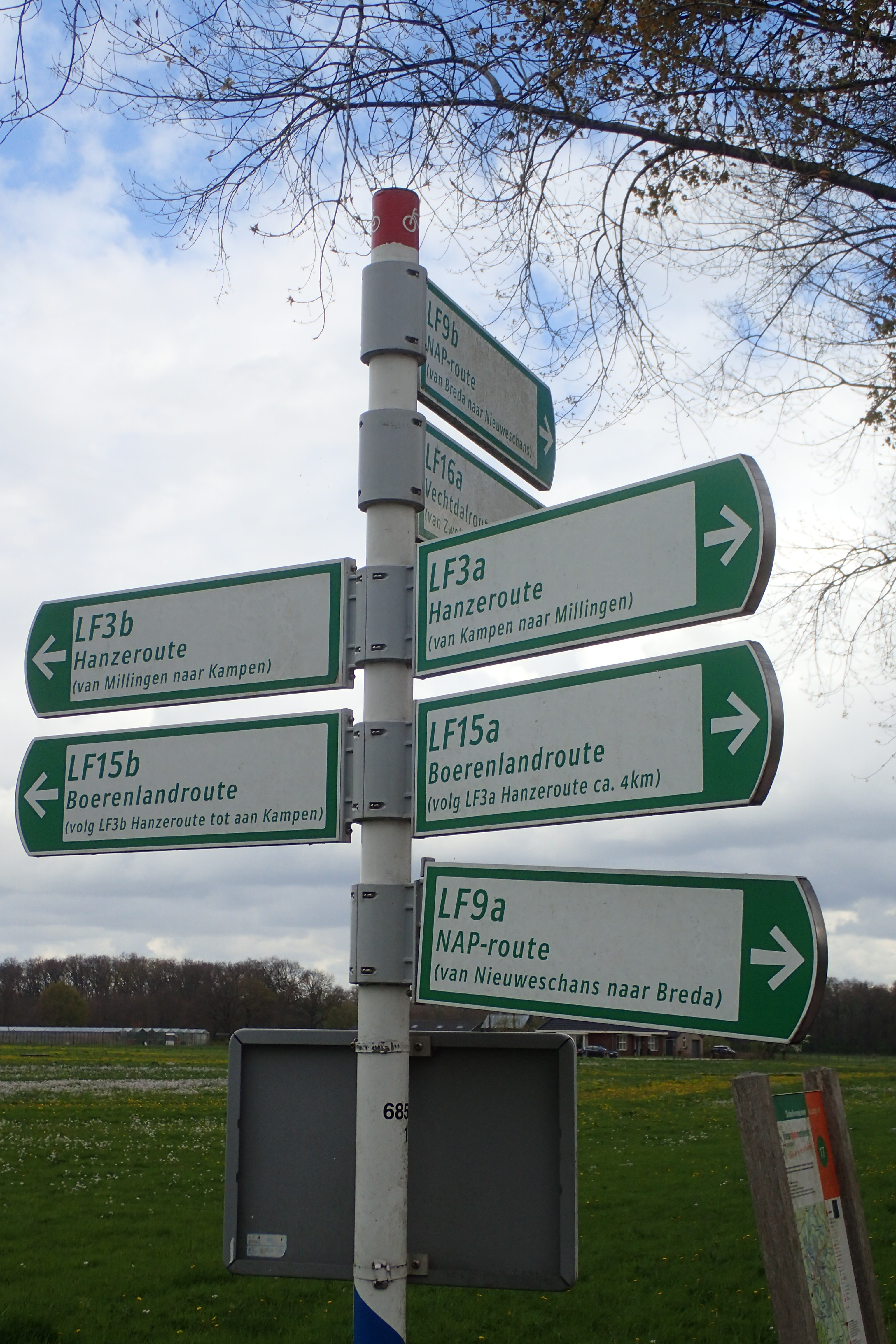 LF fietsroutes bord net buiten Zwolle